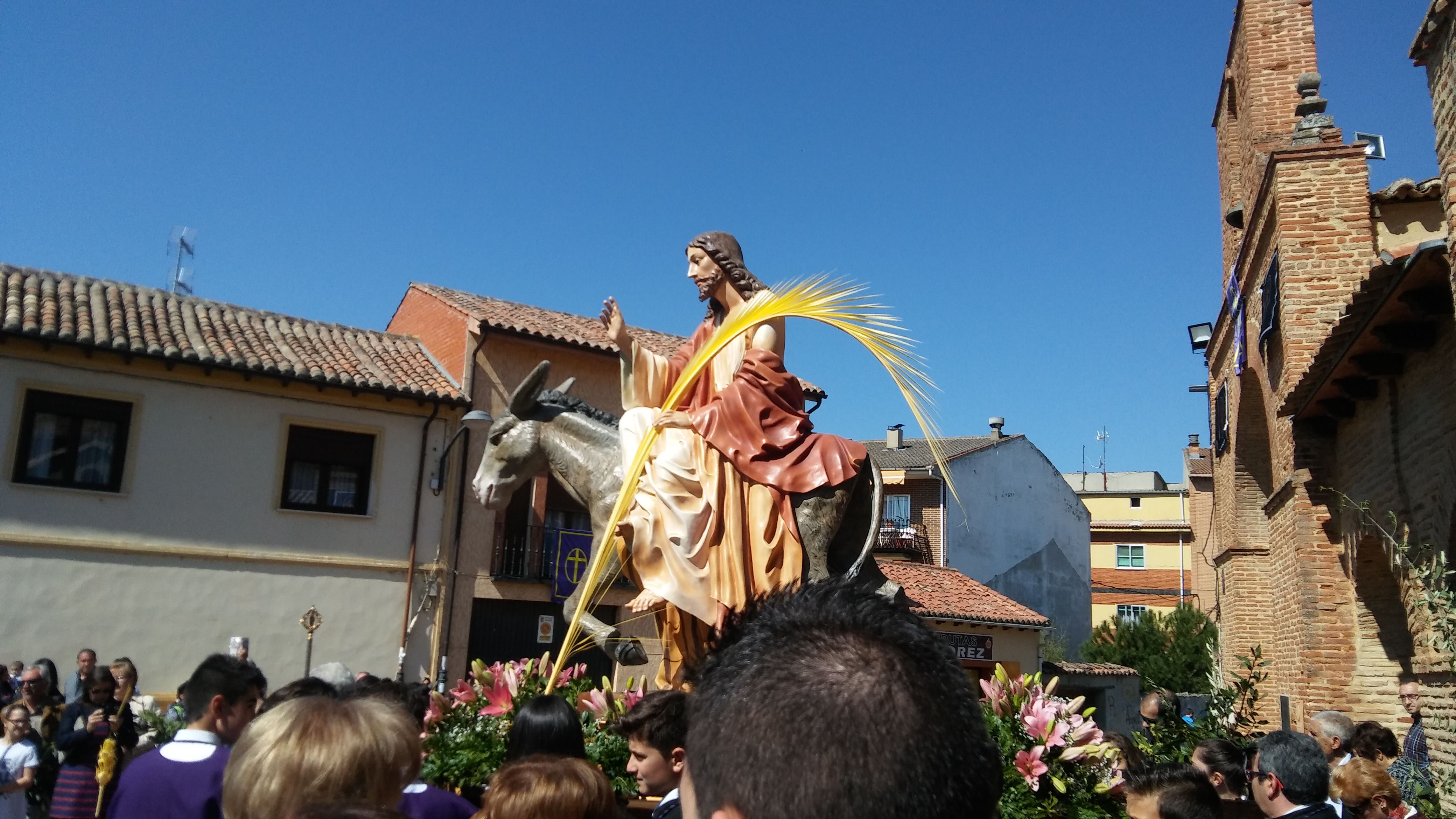 palmas sahagun